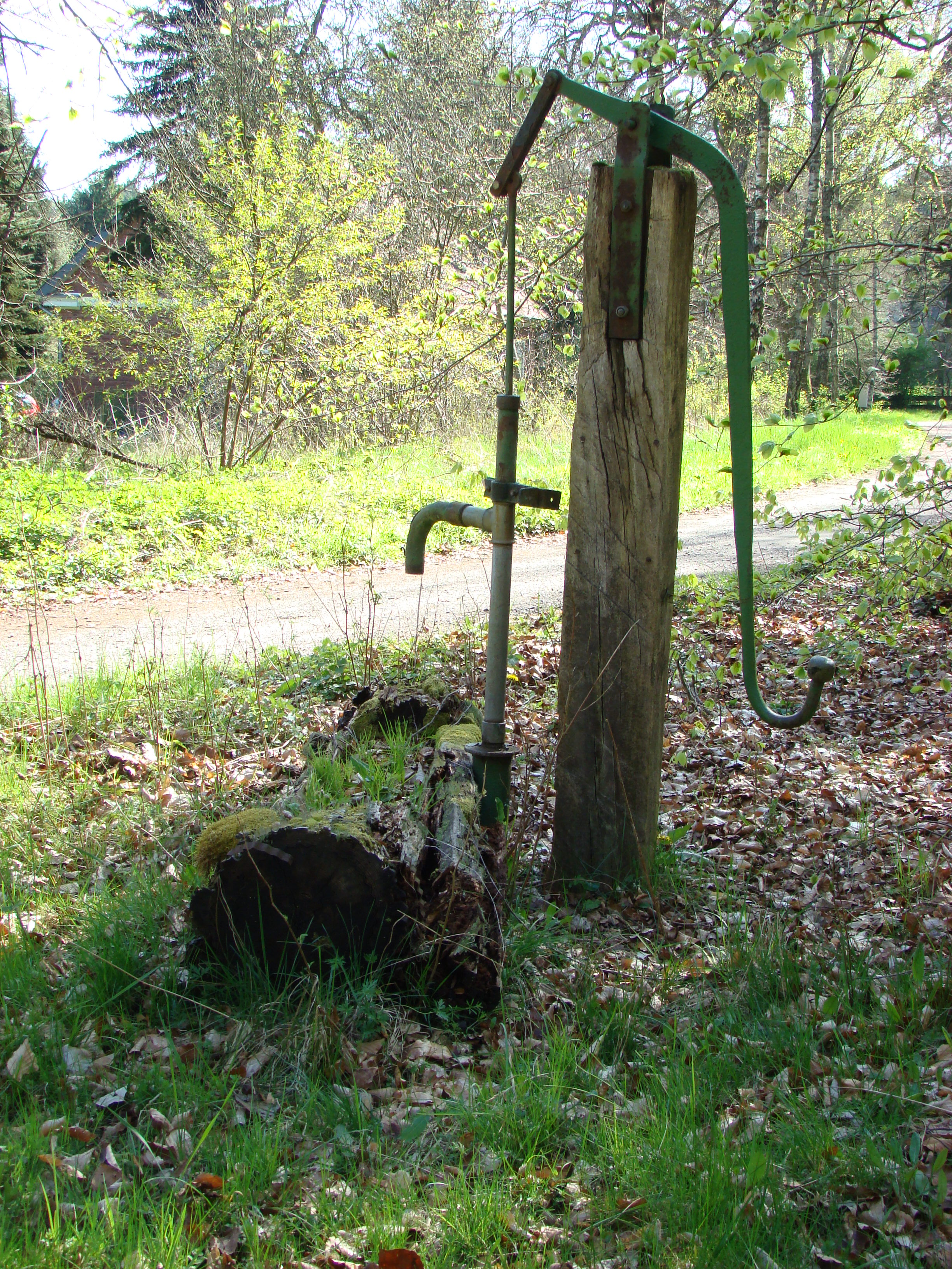 Schwengelpumpe und alter Pferdetränken-Trog an der ehemaligen Poststation Schafstall